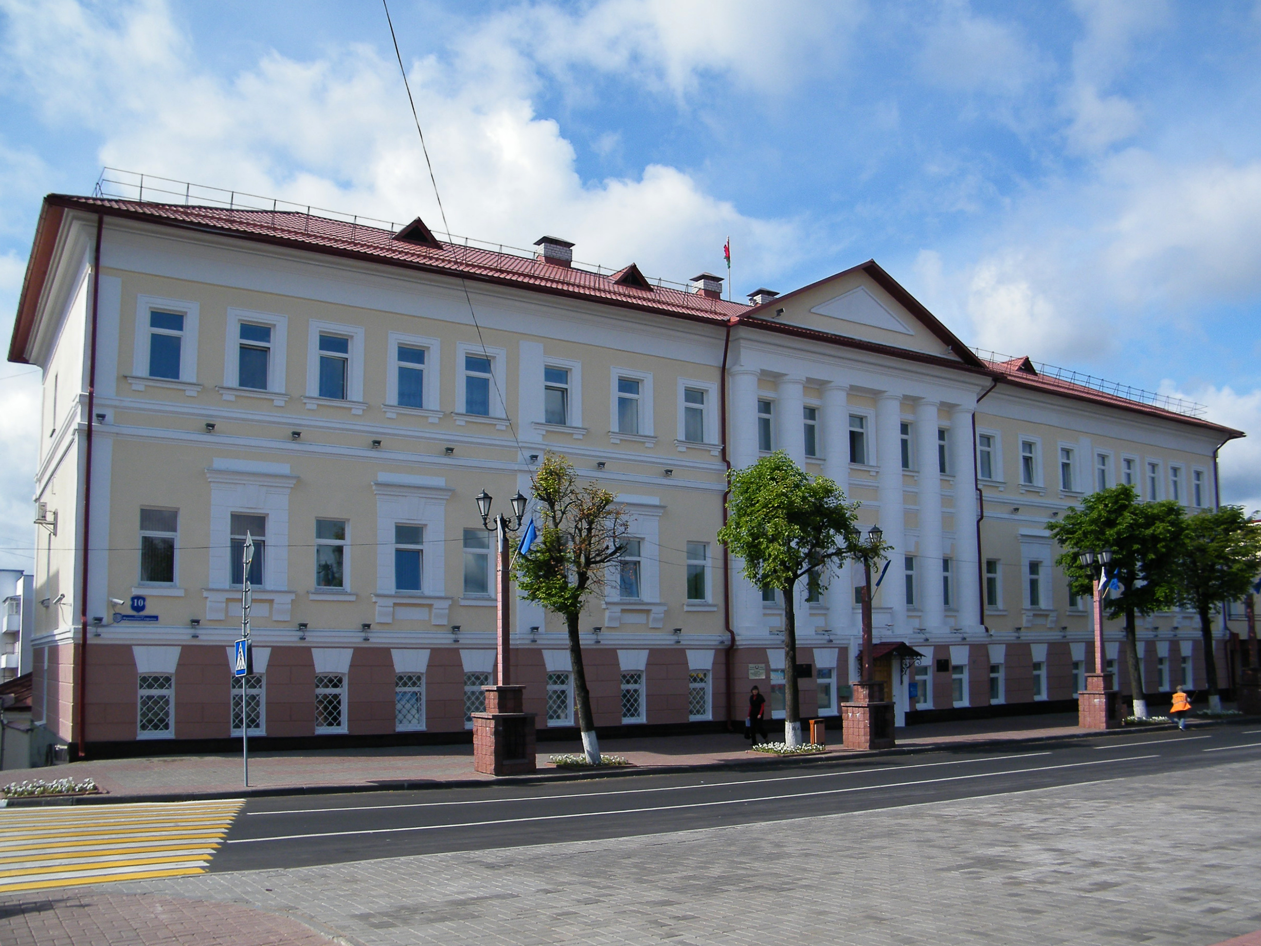 Połock - dawne seminarium duchowne